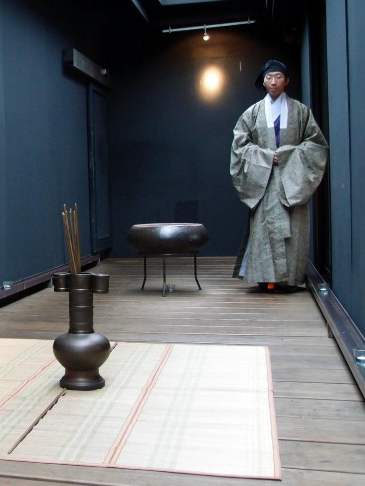 中文（香港）: 漢族室內投壺